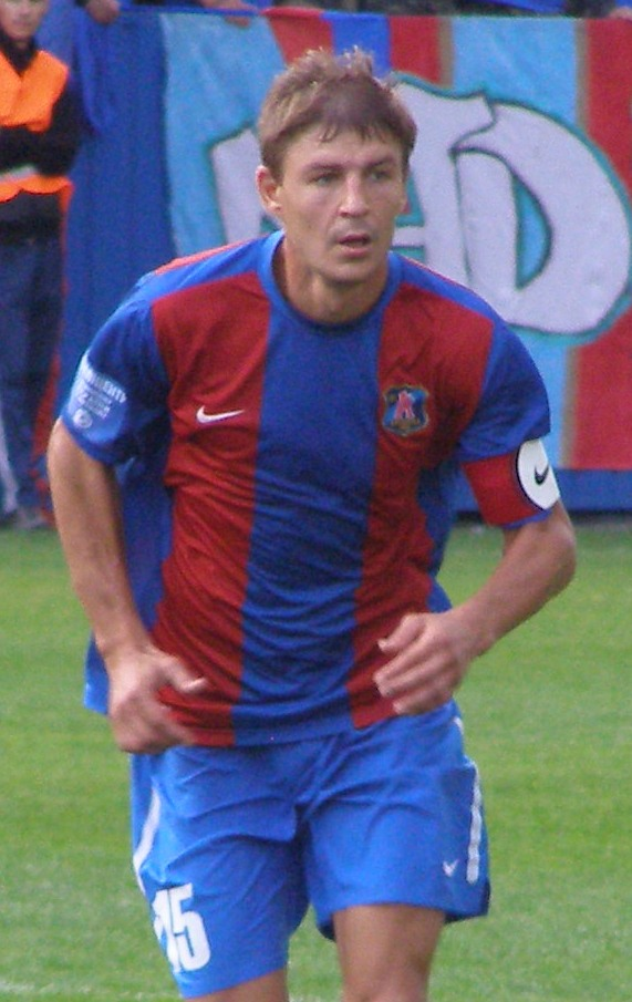 Usbekischer Fußballspieler Maksim Shatskix während dem Spiel zwischen Arsenal Kyjiw und Metalist Charkiw